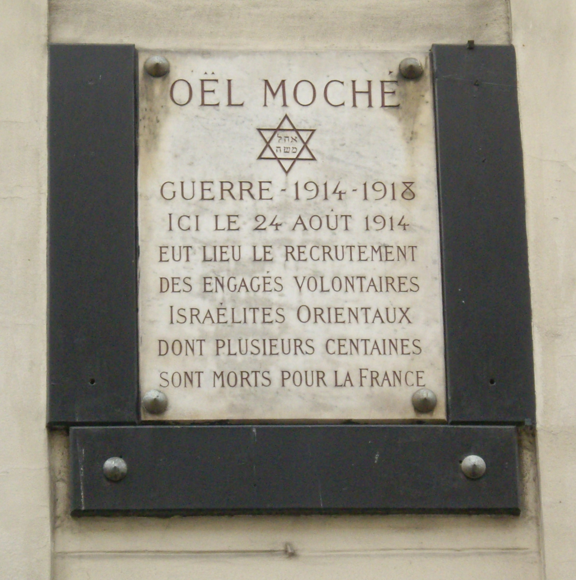 Plaque apposée au n° 68 de la rue Sedaine, Paris 11e.« Oël Moché. Guerre 1914-1918. Ici, le 24 août 1914, eut lieu le recrutement des engagés israélites orientaux, dont plusieurs centaines sont morts pour la France. »Note : Oel Moshe, société fondée en 1924 par des anciens combattants juifs ottomans pour assurer des actes funéraires et des secours de deuil à leurs compatriotes, dont deux mille avaient rejoint l'armée française pendant la Première Guerre mondiale. Voir : Annie Benveniste, Le Bosphore à la Roquette : la communauté judéo-espagnole à Paris, 1914-1940, Paris : L'Harmattan, 1978, p. 77 Texte en ligne